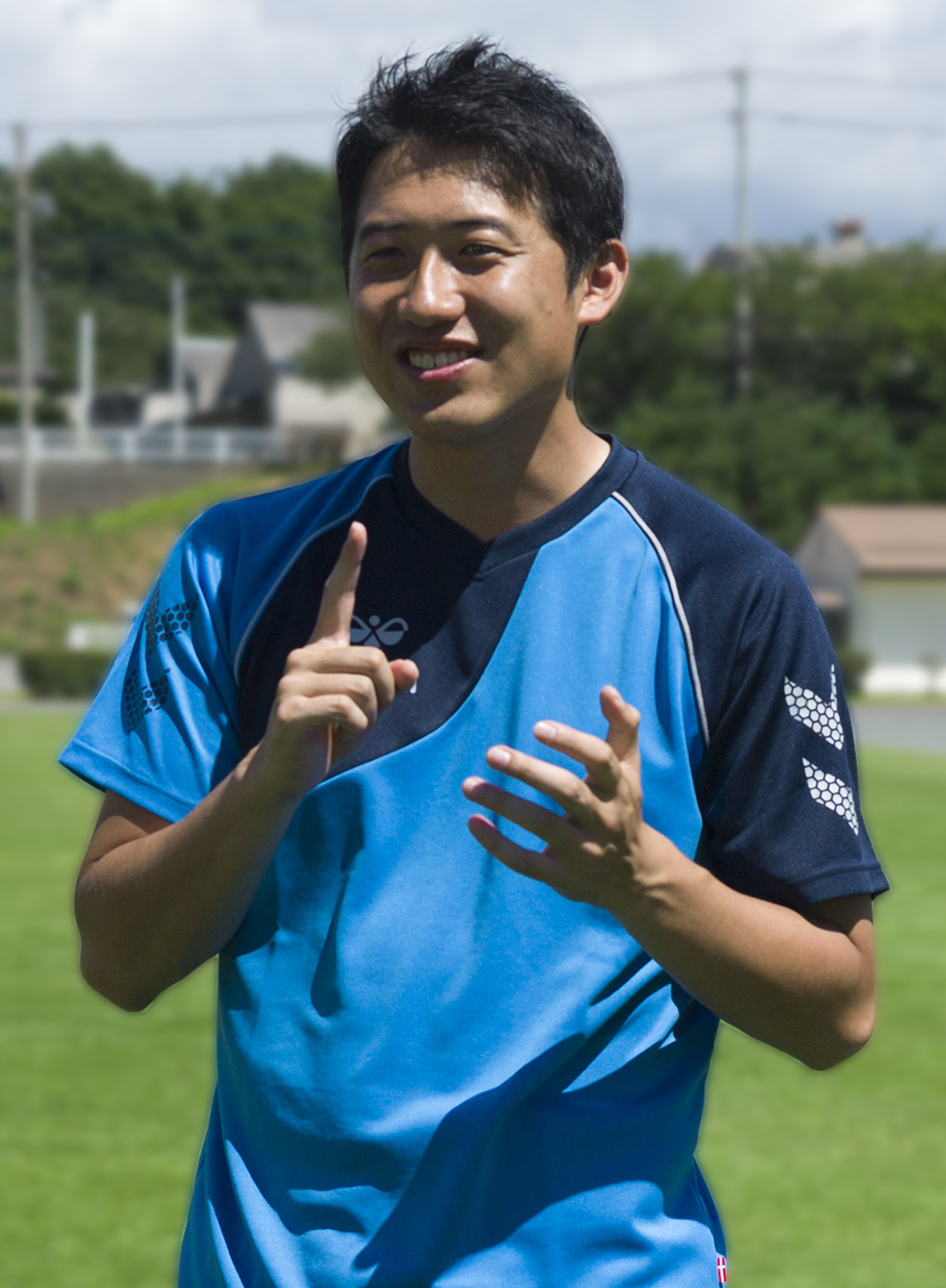 wiki用本人写真